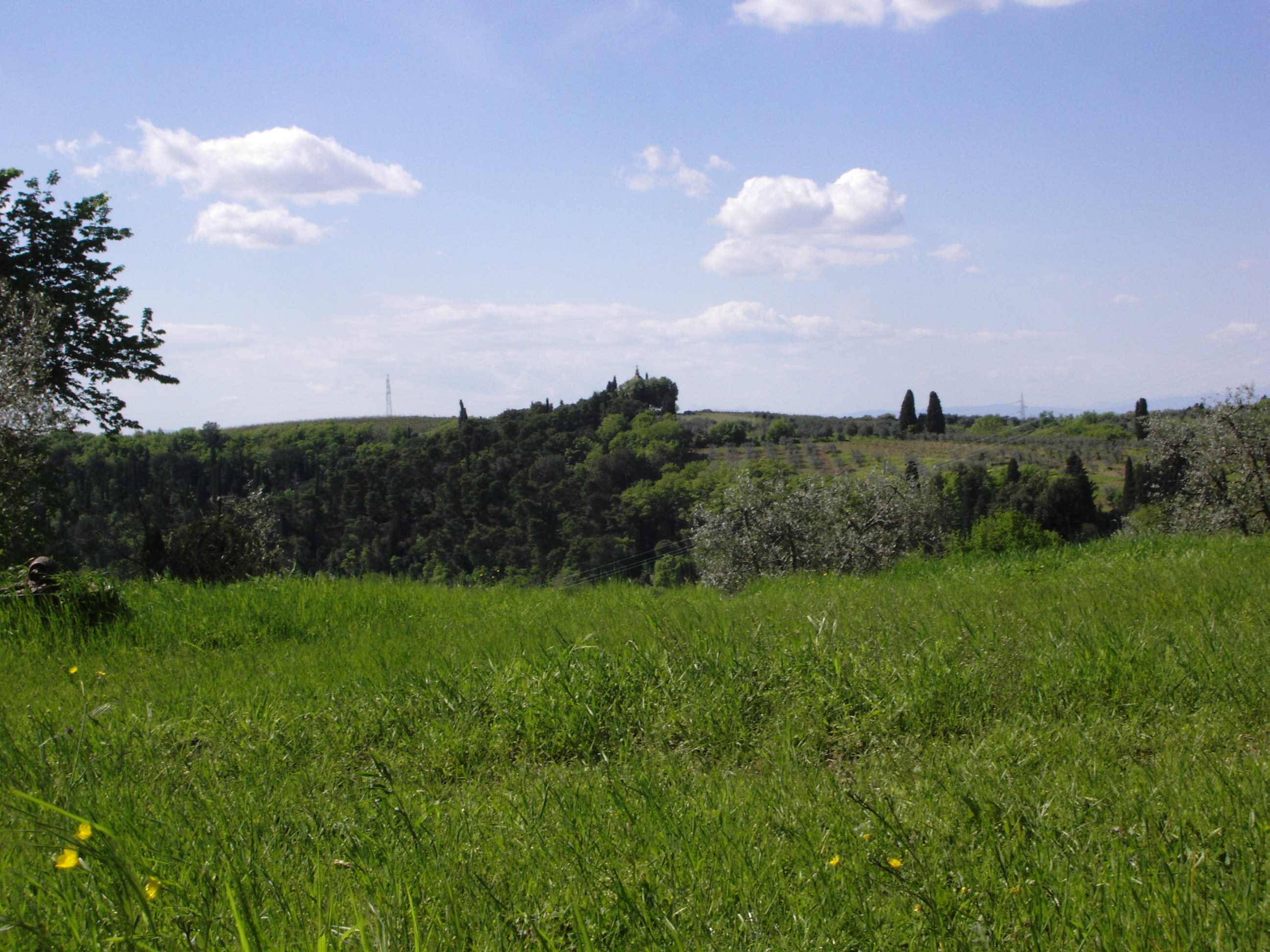 Semifonte, veduta